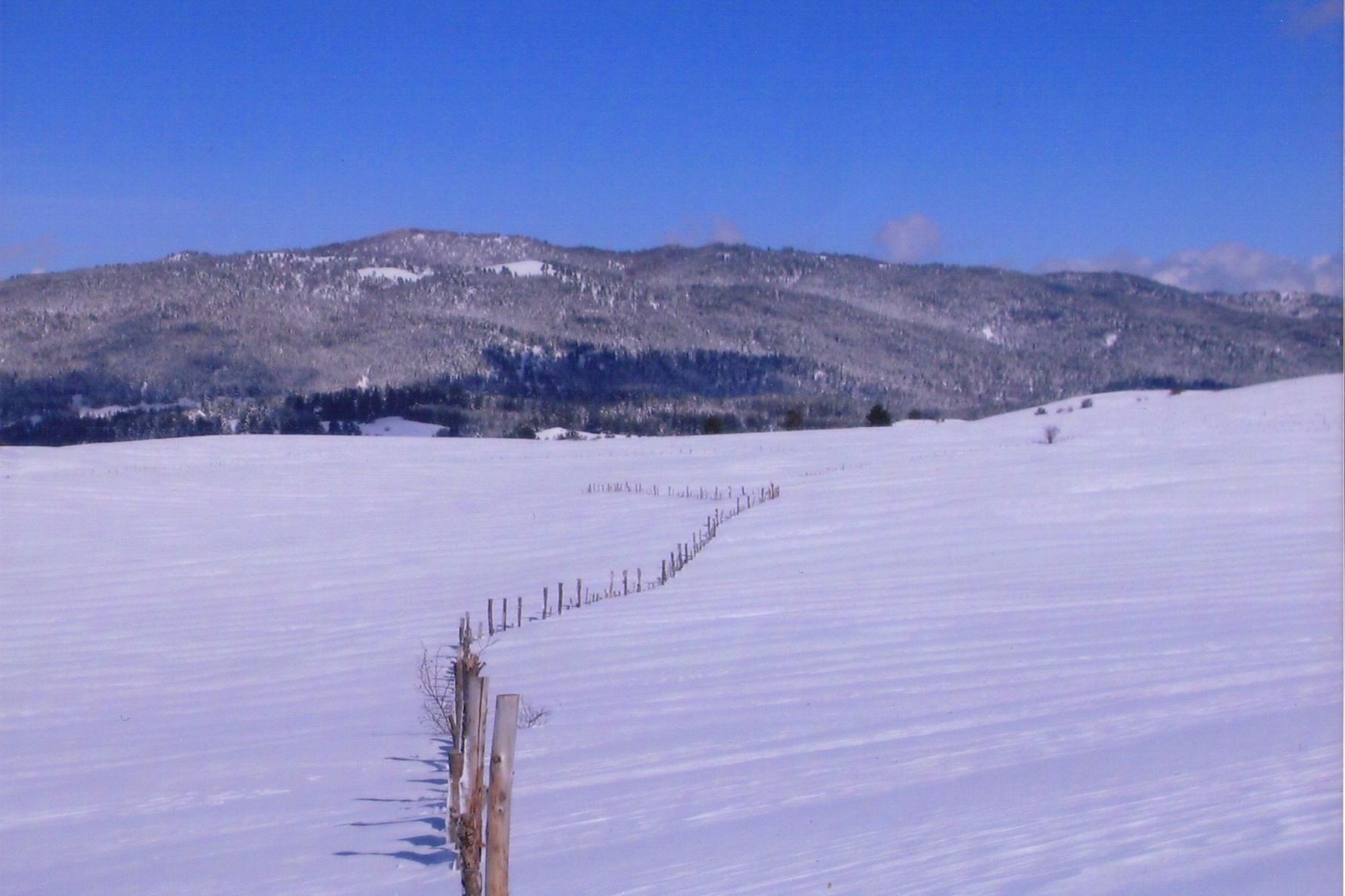 Monte Volpintesta vista dalla valle di San Nicola